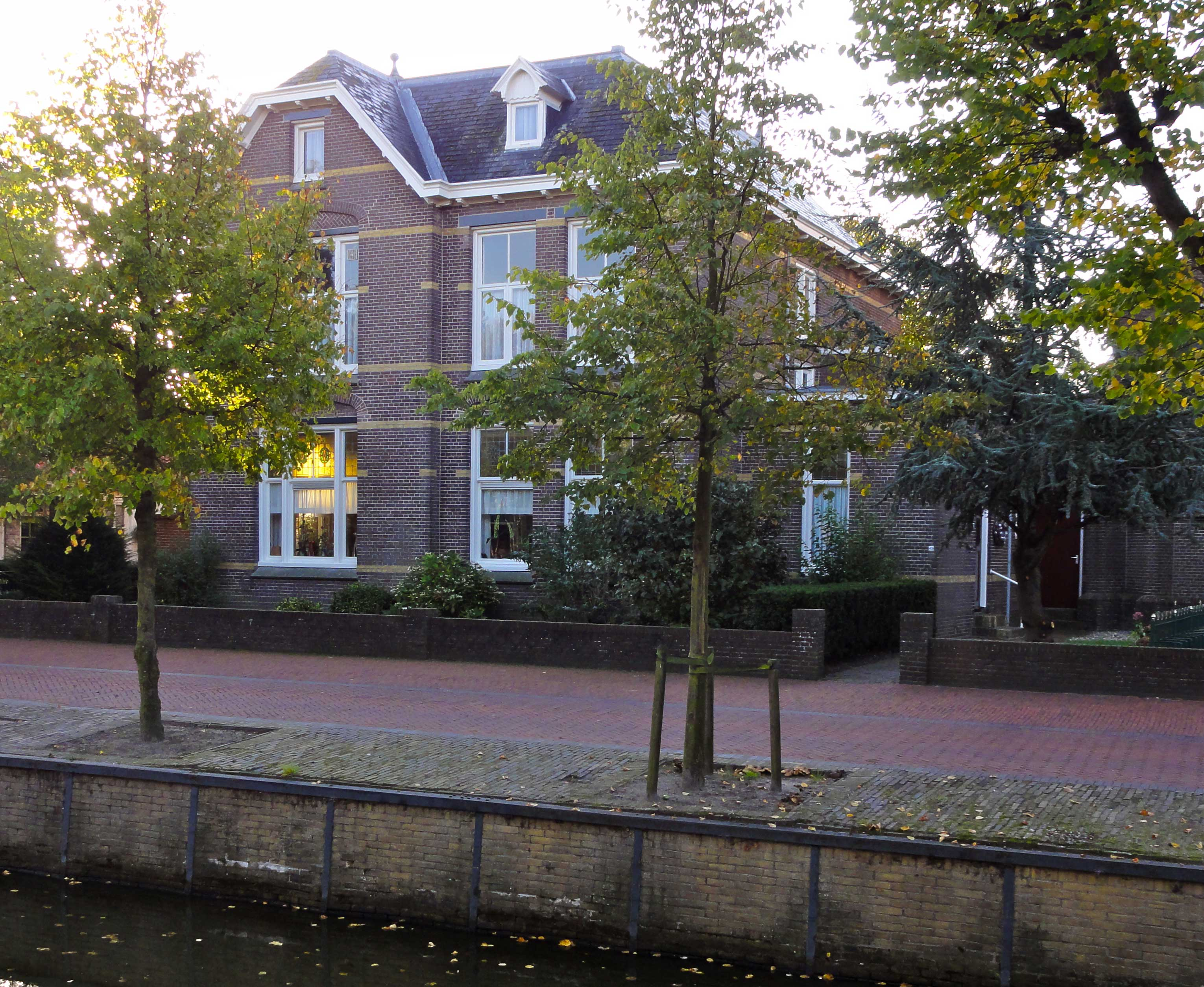 Raadhuisstraat 42 pastorie Sint-Ludgeruskerk Balk